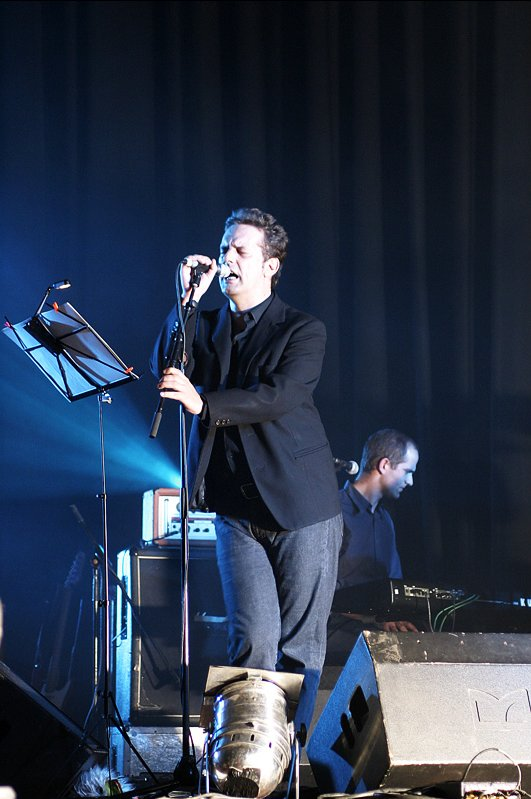 Mão Morta